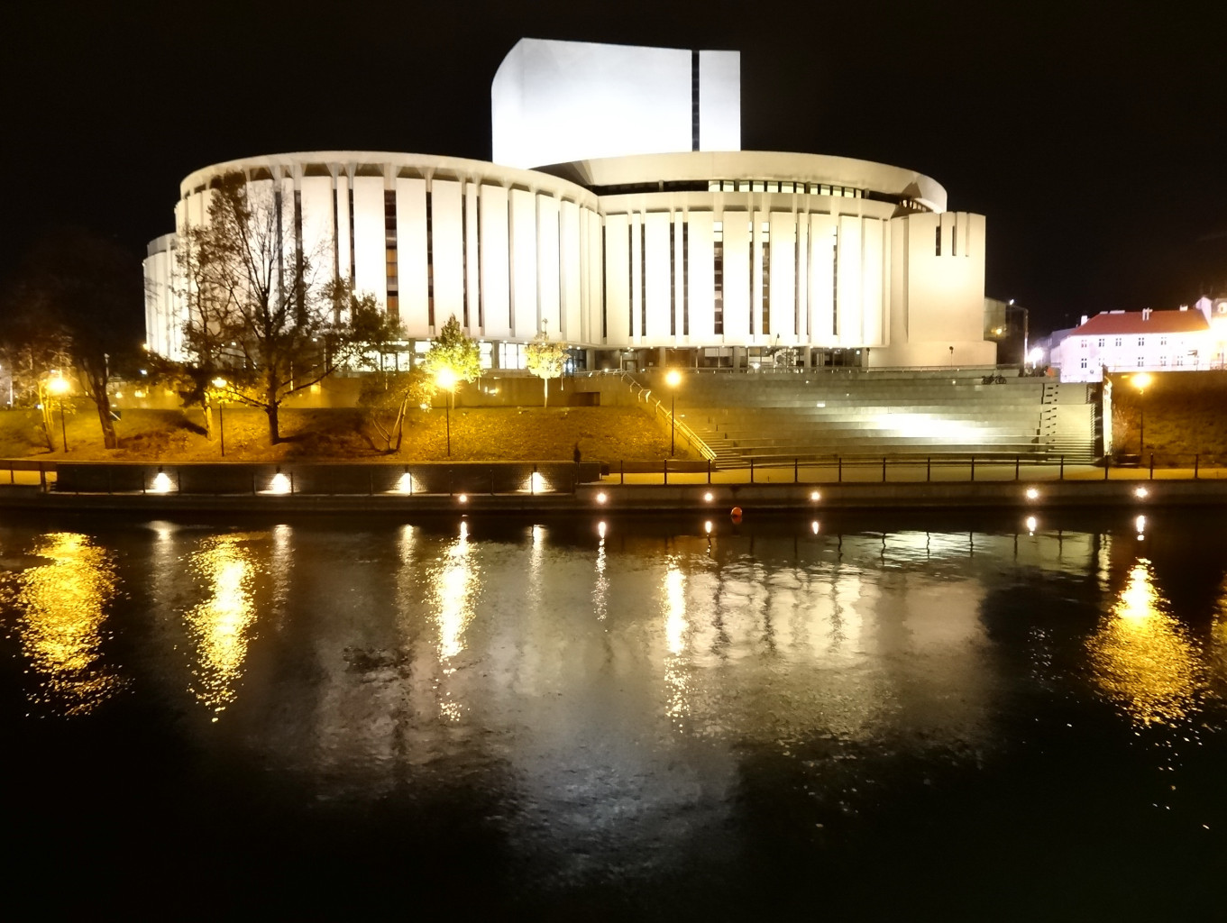 Budynek Opery Nova zbud. w latach 1973-2006, Bydgoszcz ul Ferdynanda Focha 5